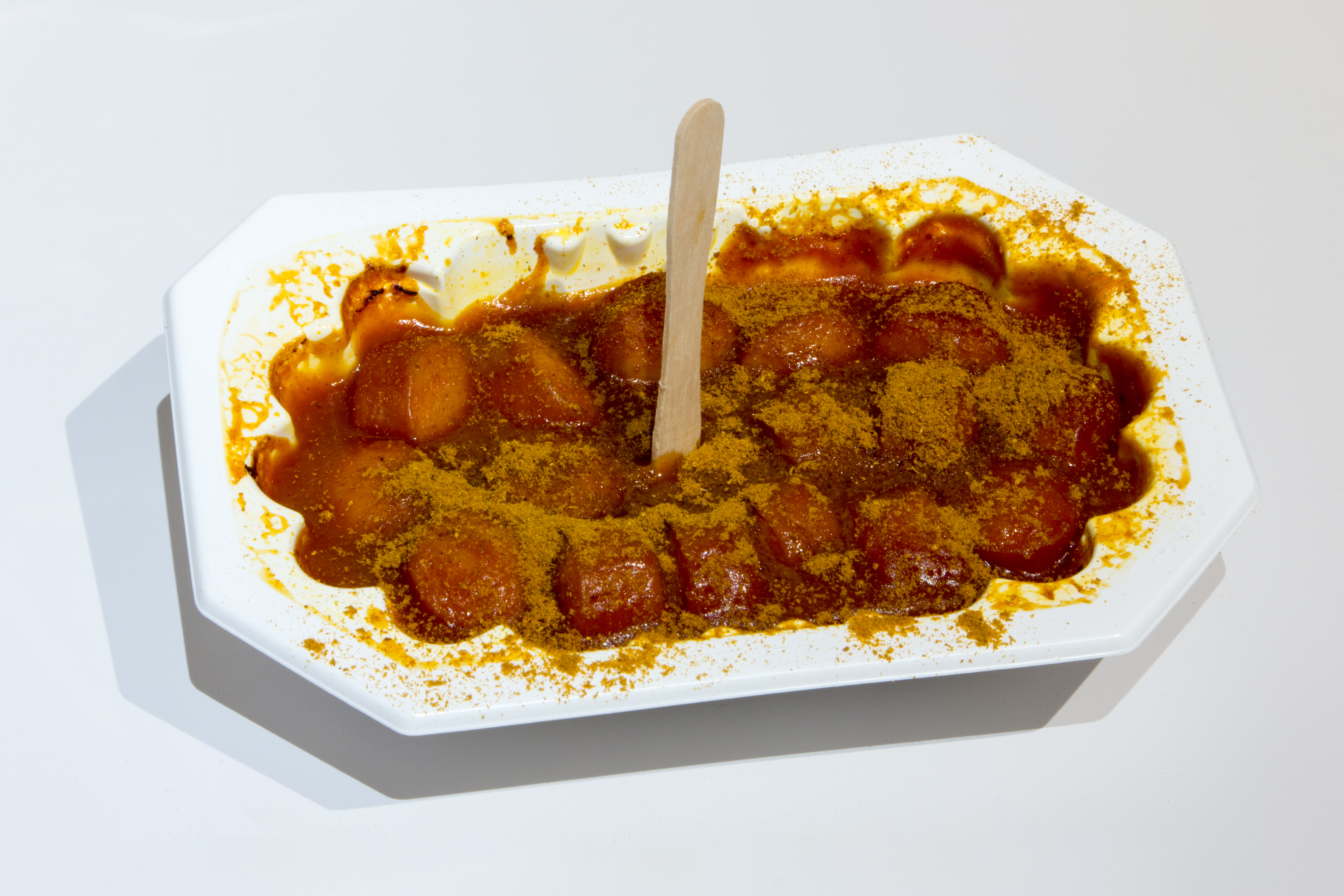 Curry King extra scharf von Meica, erhitzt in der Mikrowelle und mit beiliegendem Currypulver bestreut